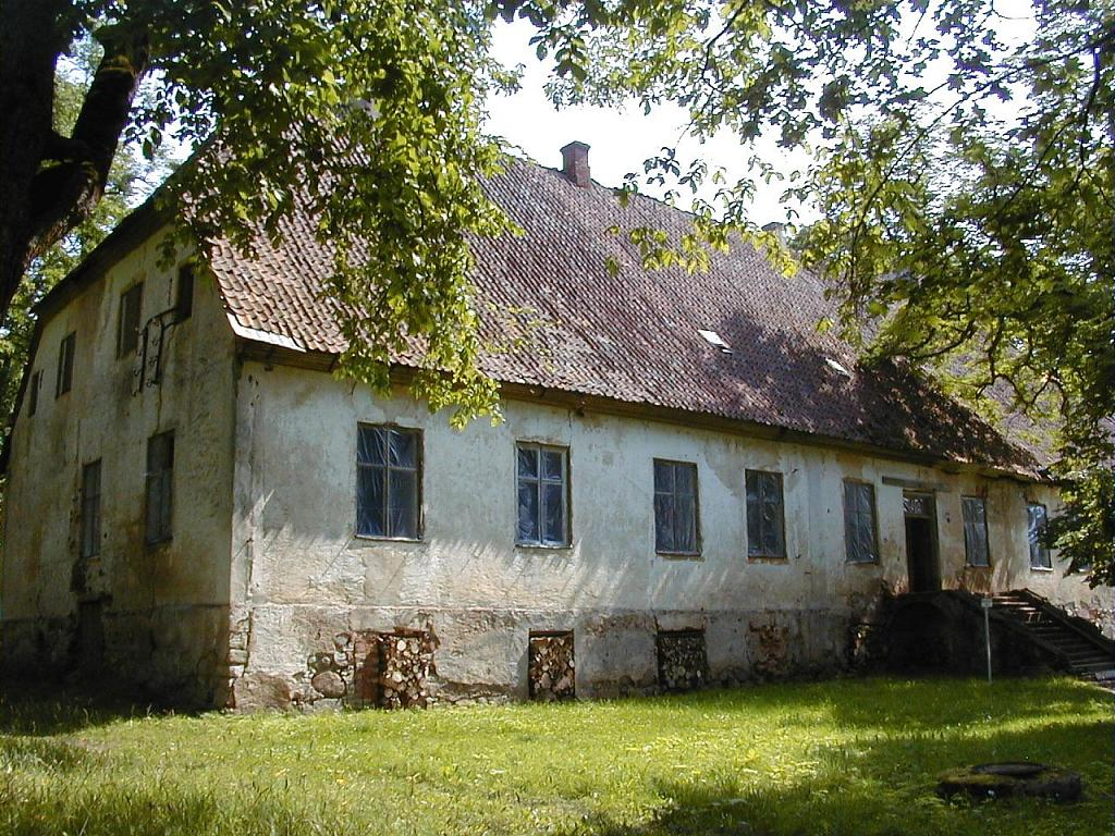 Briņķpedvāles muiža Sabilē 2002-07-11